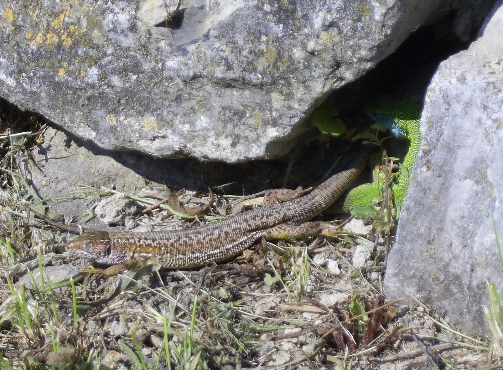 Eine männliche und eine weibliche Östliche Smaragdeidechse